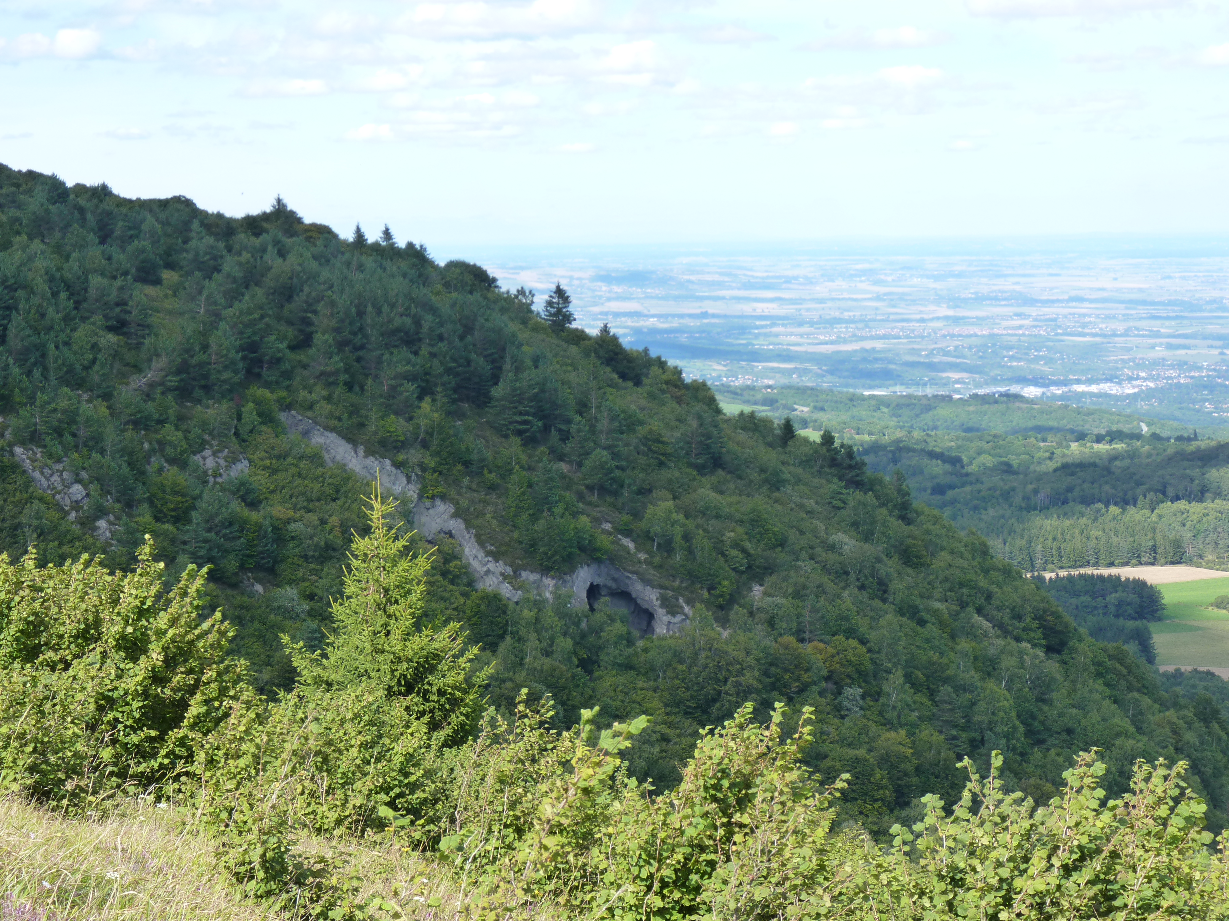 Une vue du Grand Sarcoui (1 147m) avec sa grotte depuis le Puy des Goules (1 146m)